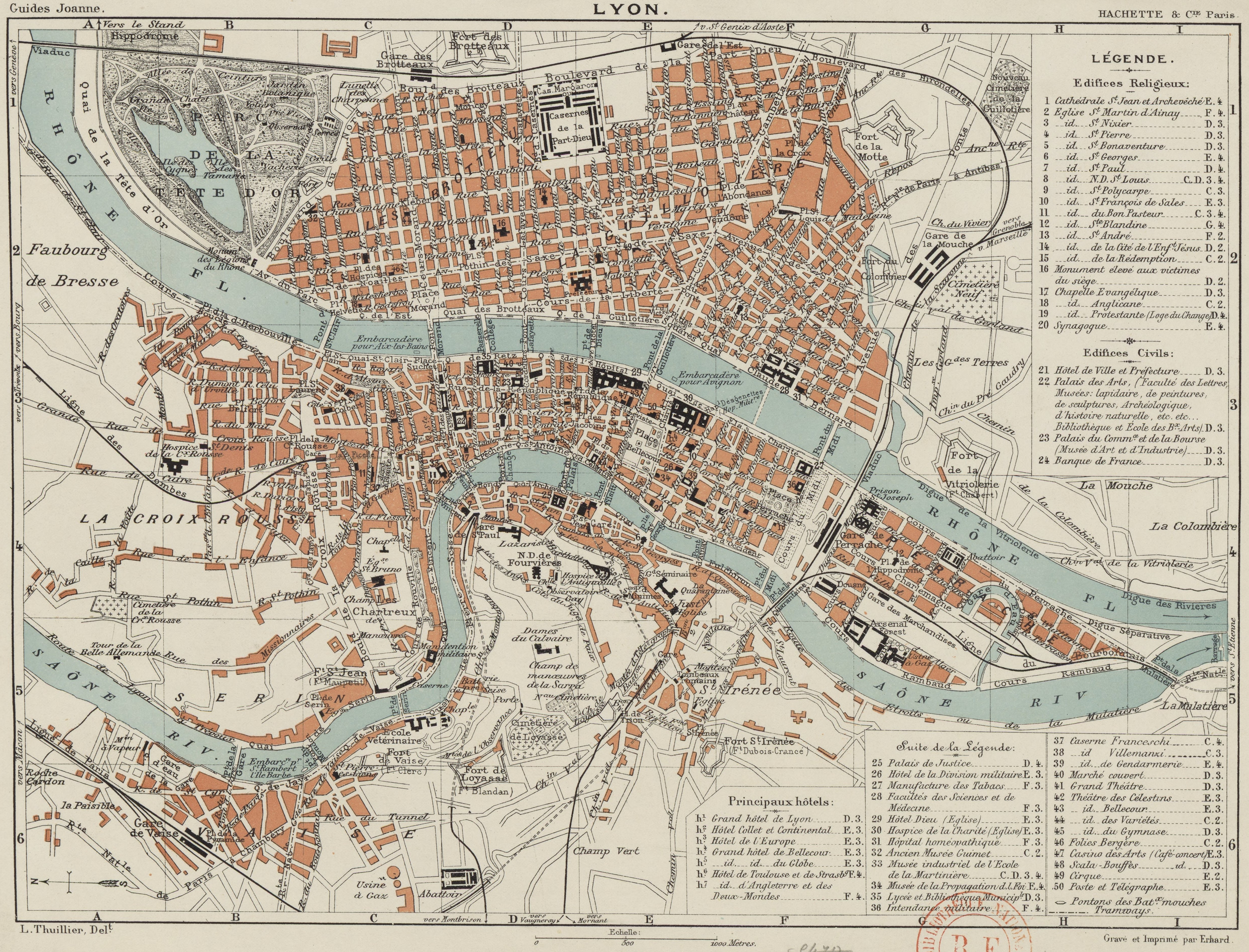 Guides Joanne, Lyon.